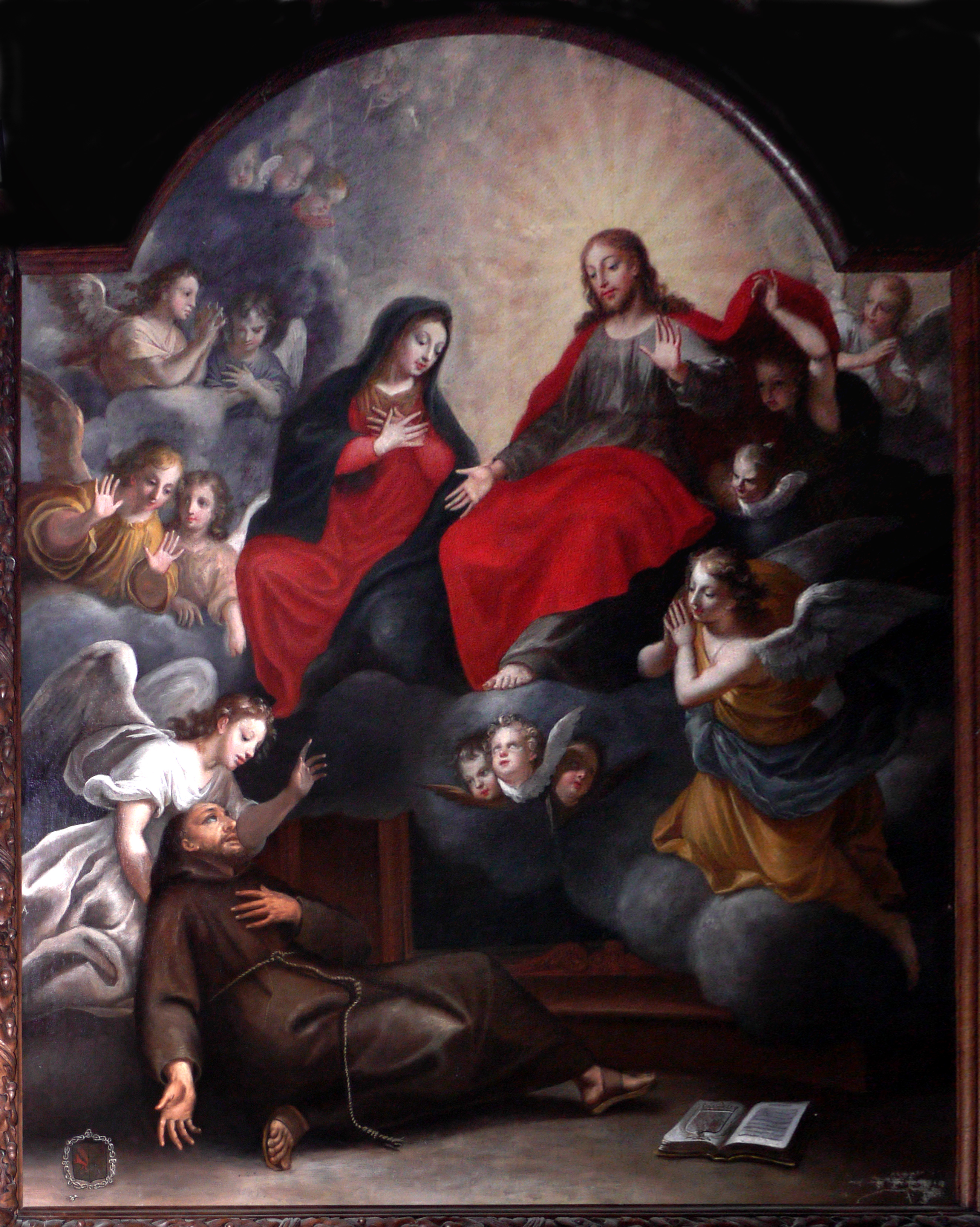 Christ et la vierge apparaissant à Saint François